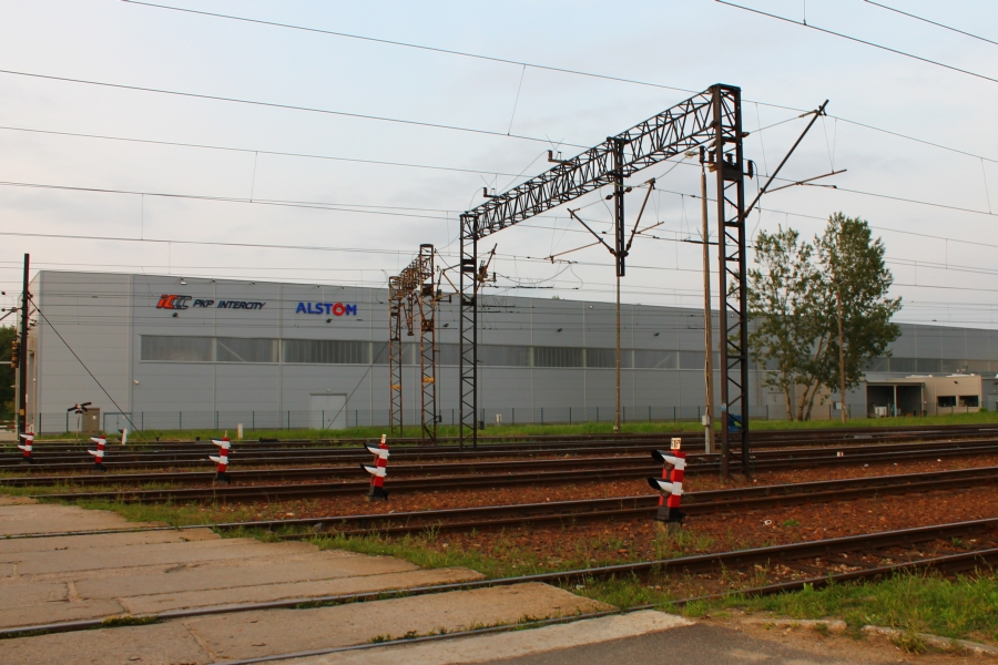 Hala warsztatowa pociągów ED250 Pendolino będąca częścią Centrum Serwisowego Pociągów Dużych Prędkości na terenie stacji postojowej Warszawa Grochów.